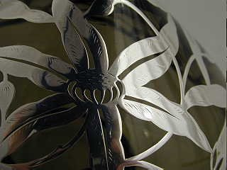 Carl Spahr: Silberoverlay auf Glas (Detail)